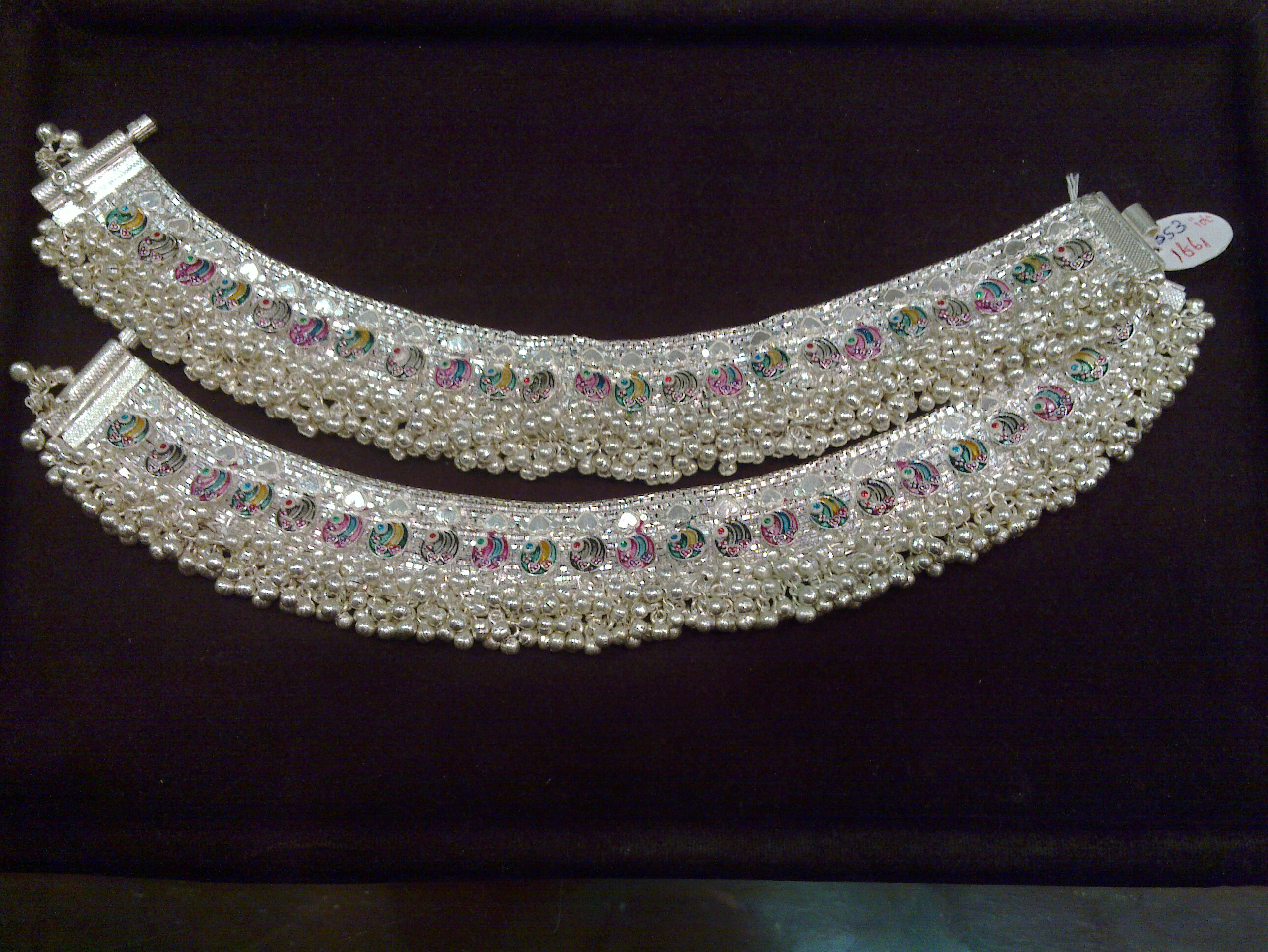 kolusu